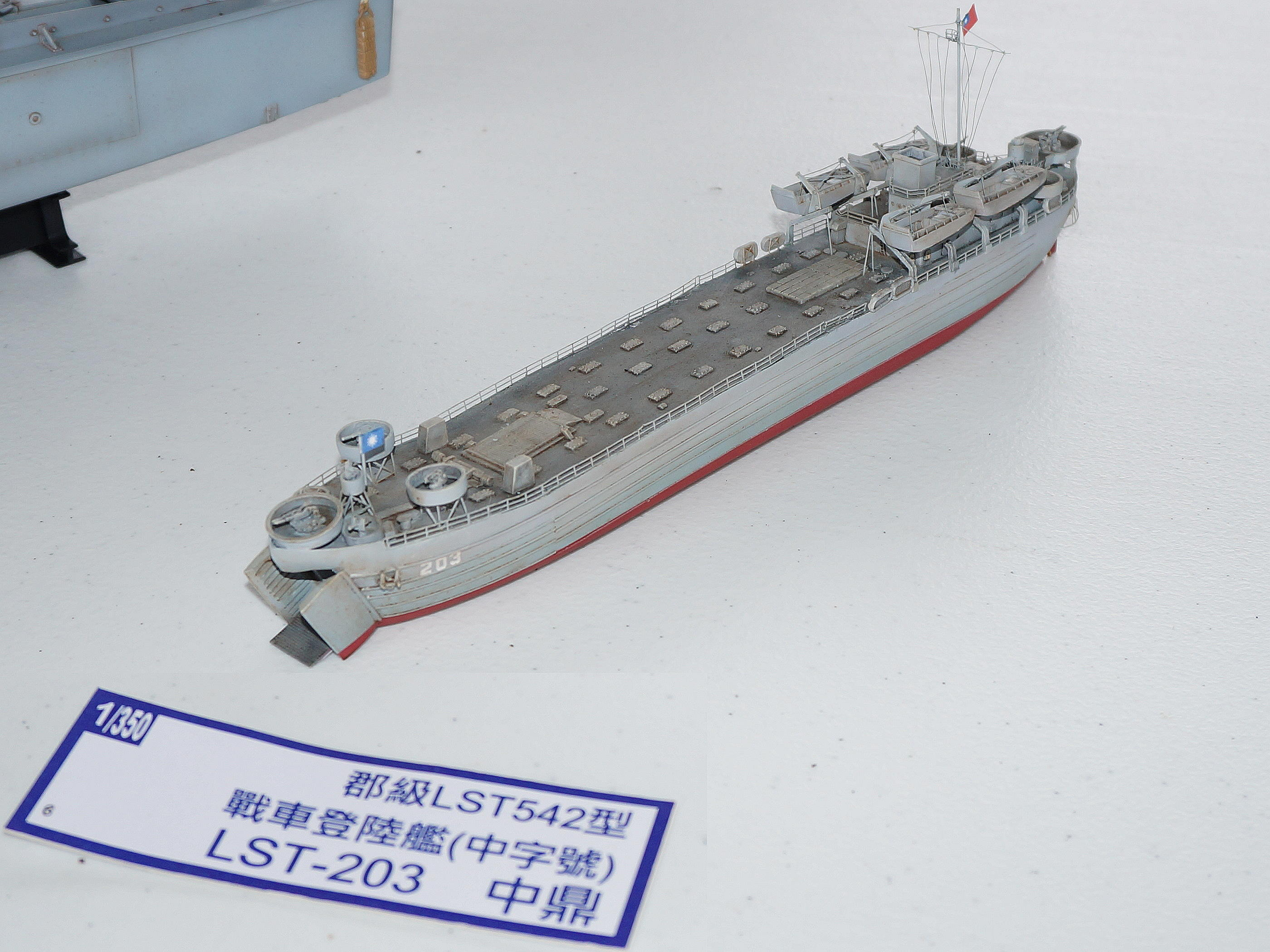 中華民國海軍基隆威海營區開放參觀，基隆港東岸碼頭，海軍中鼎軍艦（LST-203）1:350比例模型。